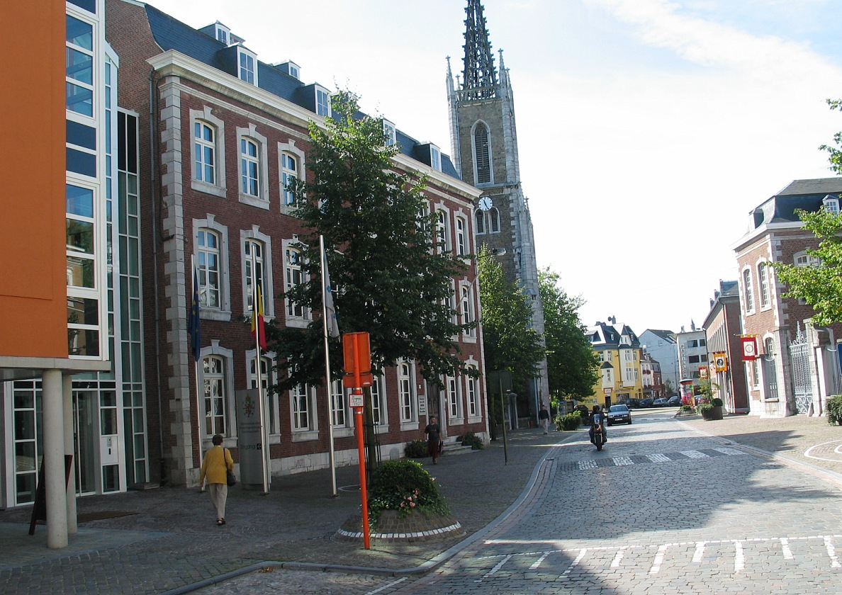 Gerichtsgebäude in Eupen („Friedensgericht“) an der Klötzerbahn, ehemaliges Fabrikantenhaus.